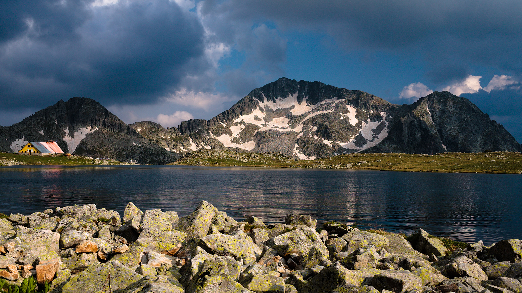 Пирин, Каменица в Пирин планина